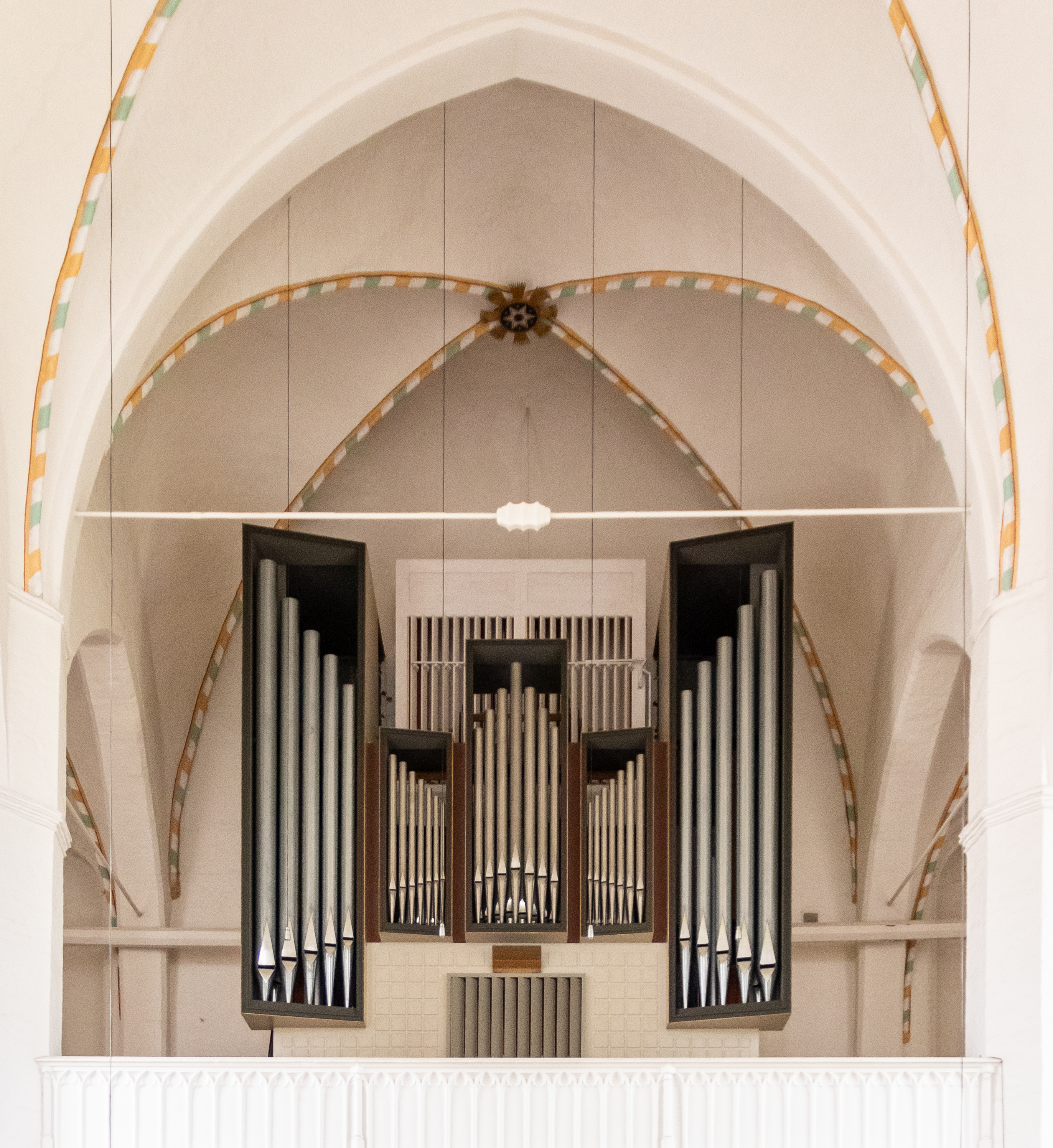 Klosterkirche Bordesholm - Orgel